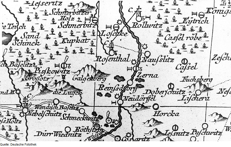 Original image description from the Deutsche Fotothek Ralbitz-Rosenthal-Zerna. Oberlausitzkarte, Schenk, 1759